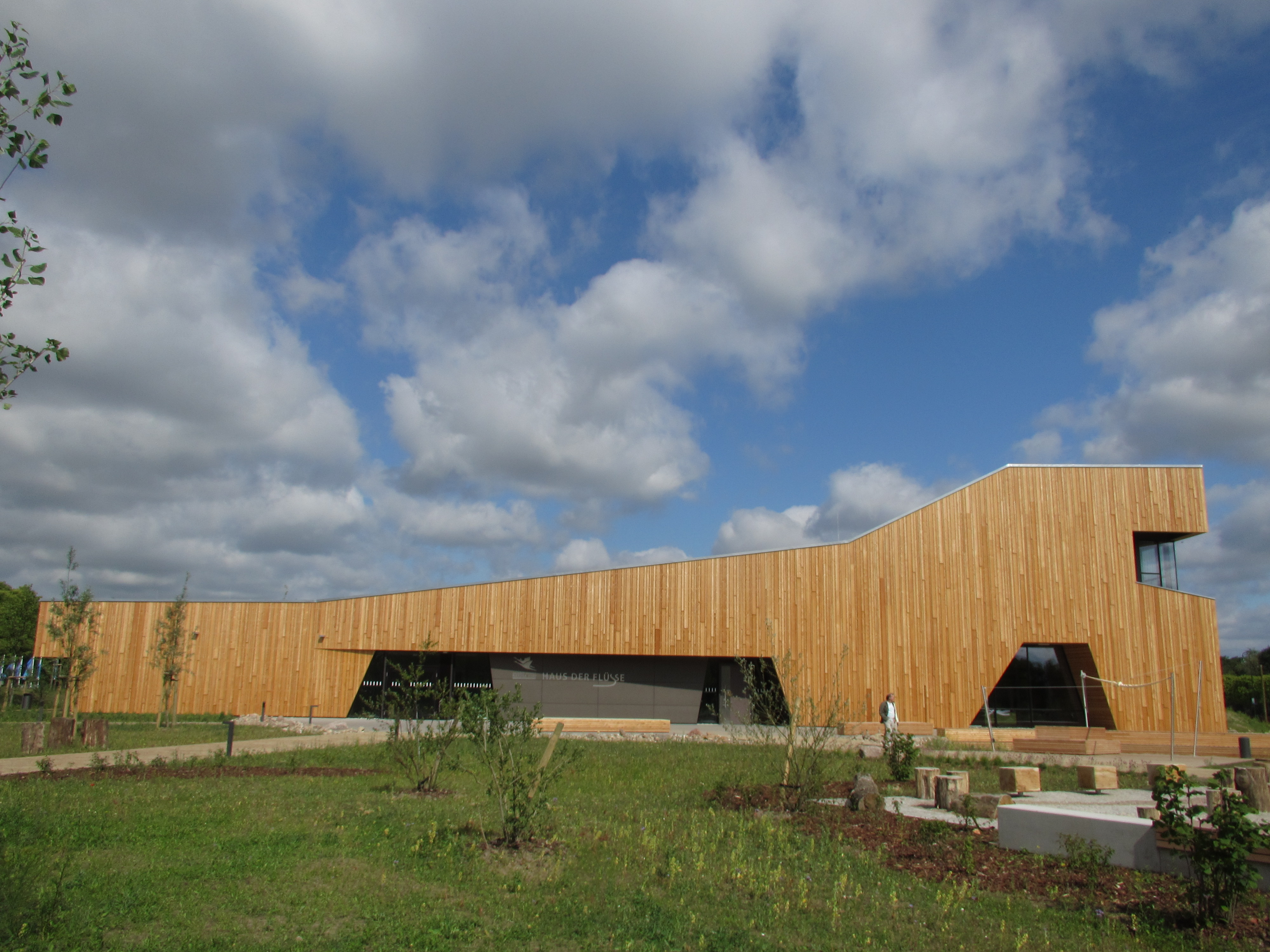 Haus der Flüsse - Natura 2000 Informationszentrum des Biosphärenreservates Mittelelbe, Elbstraße 2, 39539 Havelberg